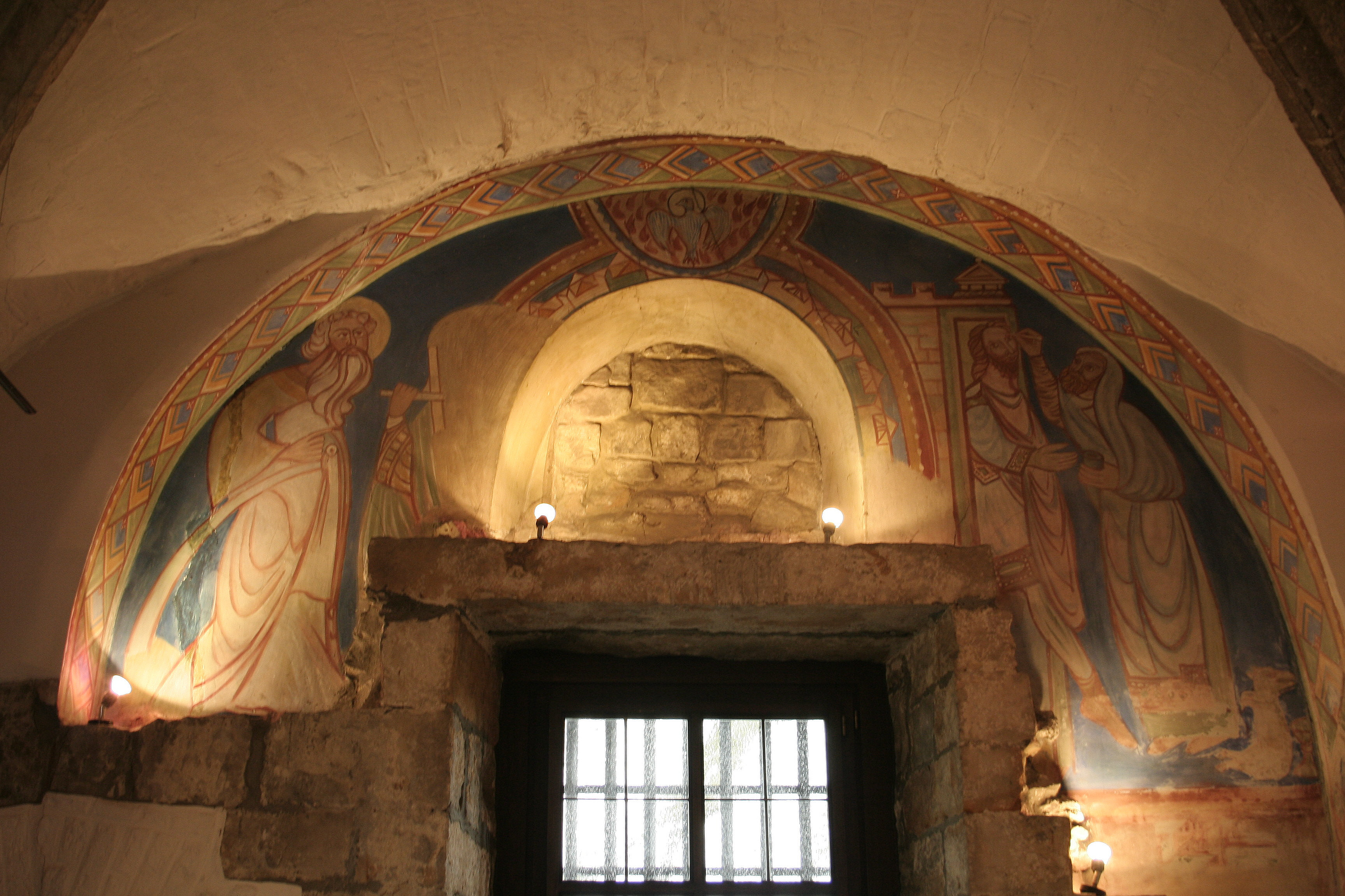 Mons, intérieur de la chapelle Saint-Calixte (milieu du XIe siècle - après 1050).